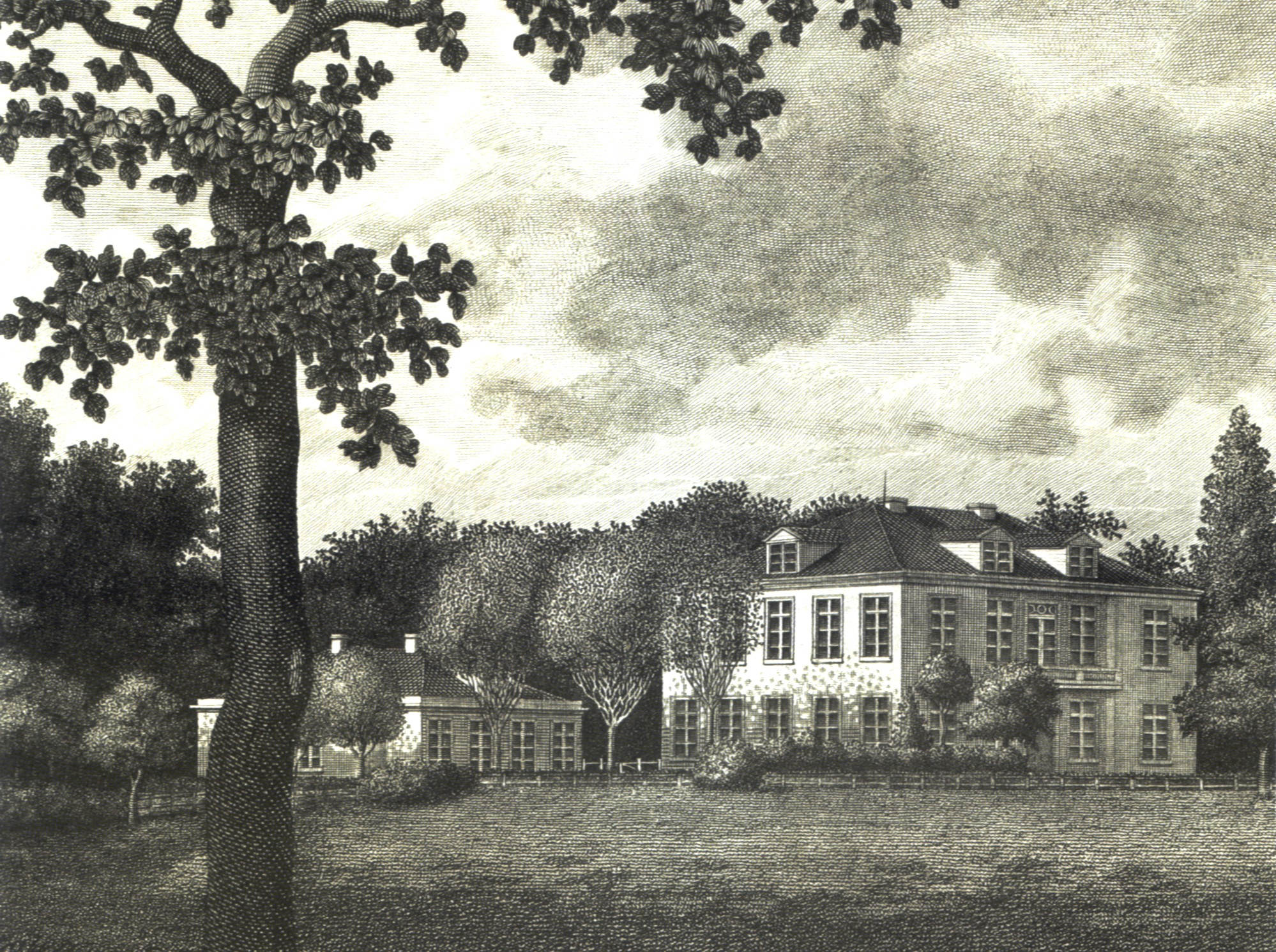 Landhaus von Senator Johann Arnold Günther, Hammer Landstraße kurz vor dem Hammer Baum, Ansicht von der Gartenseite, Kupferstich von G. A. Lehmann